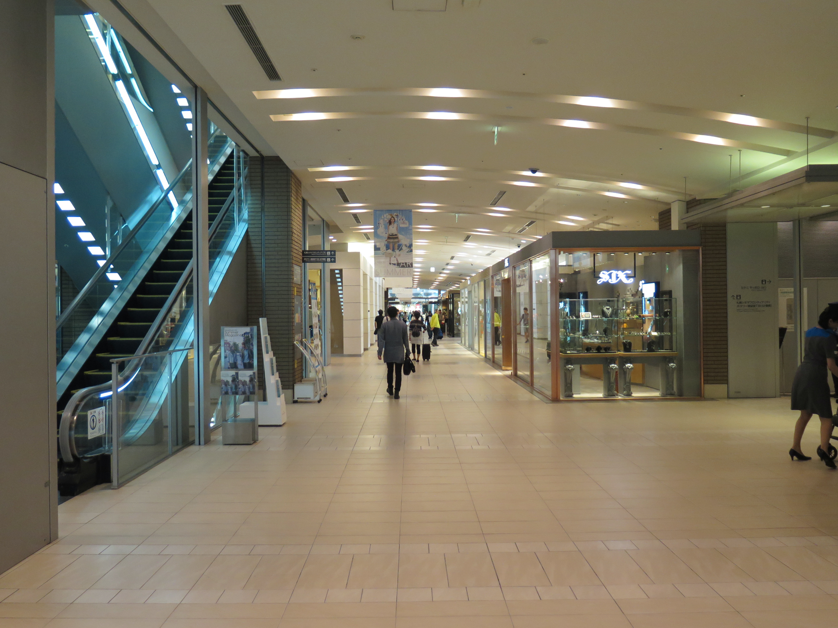 Stellar Place Sapporo Level 1